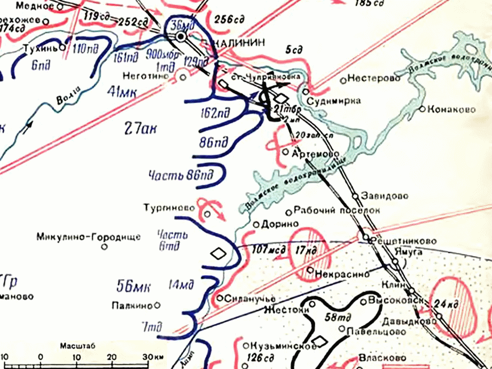 Оставление села Тургиново частями 107 мотострелковой дивизии на фрагменте карты-схемы "Положение и планы сторон на западном (московском) направлении к середине ноября 1941 г." из "Разгром немецко-фашистских войск под Москвой. Схемы (М.: Воениздат, 1964)"